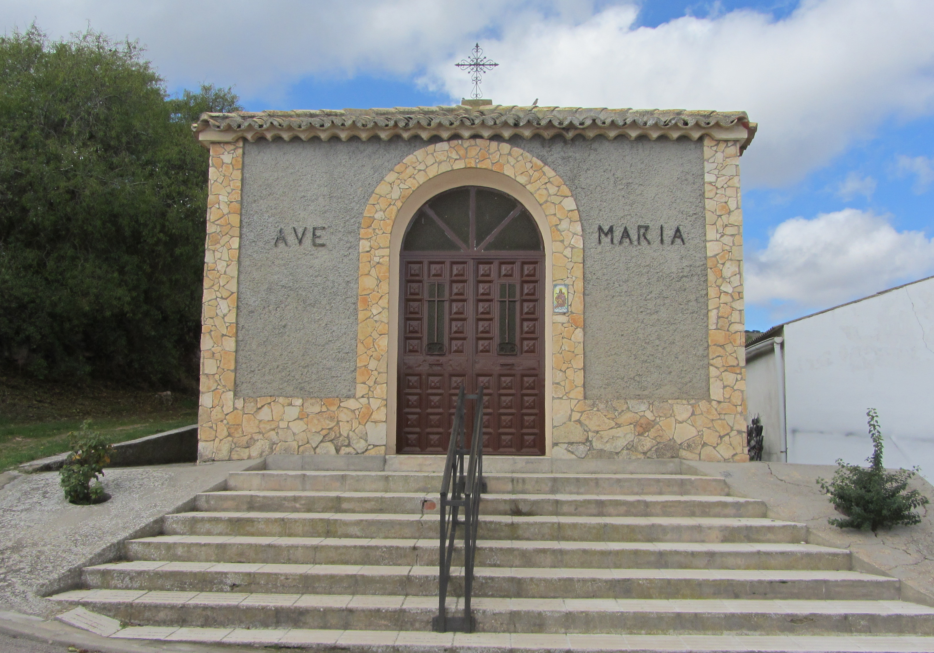 Ermita de la Virgen del Carmen en Vellisca (Provincia de Cuenca - España).